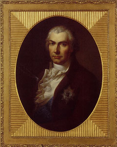 Porträtansicht des Christian Ditlev Reventlow (1748–1827)